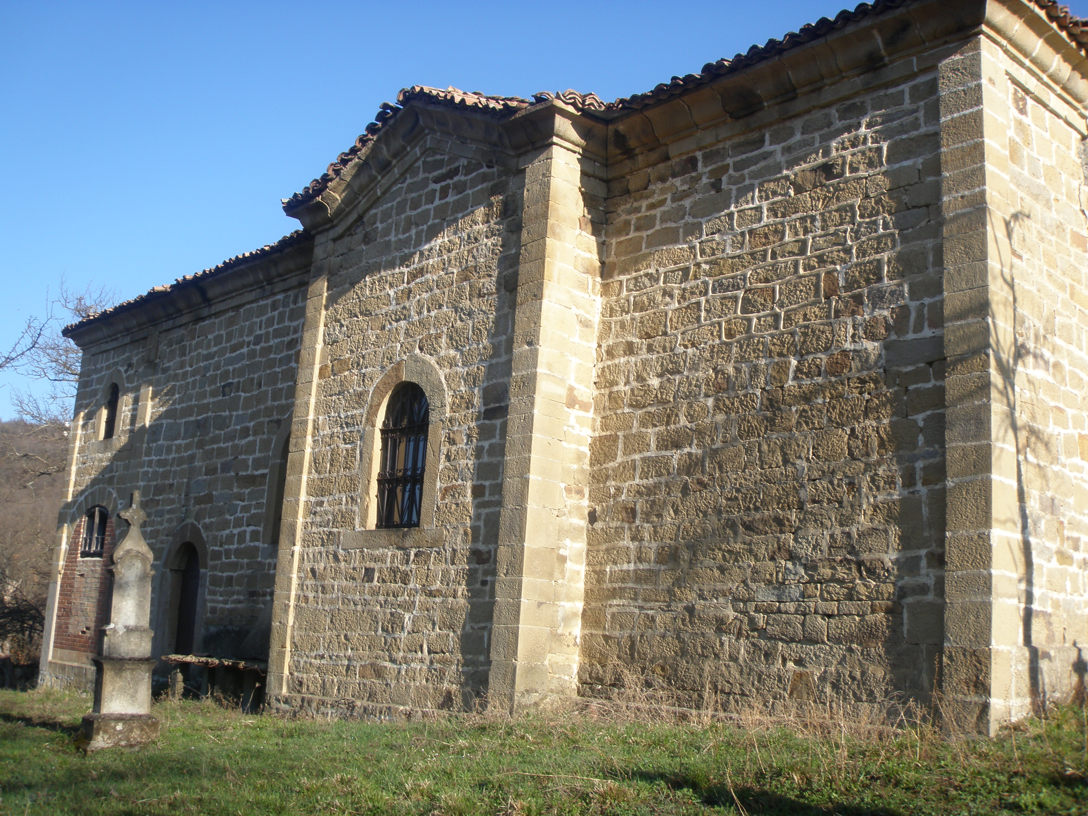 Църквата ″Свети Архангел Михаил″